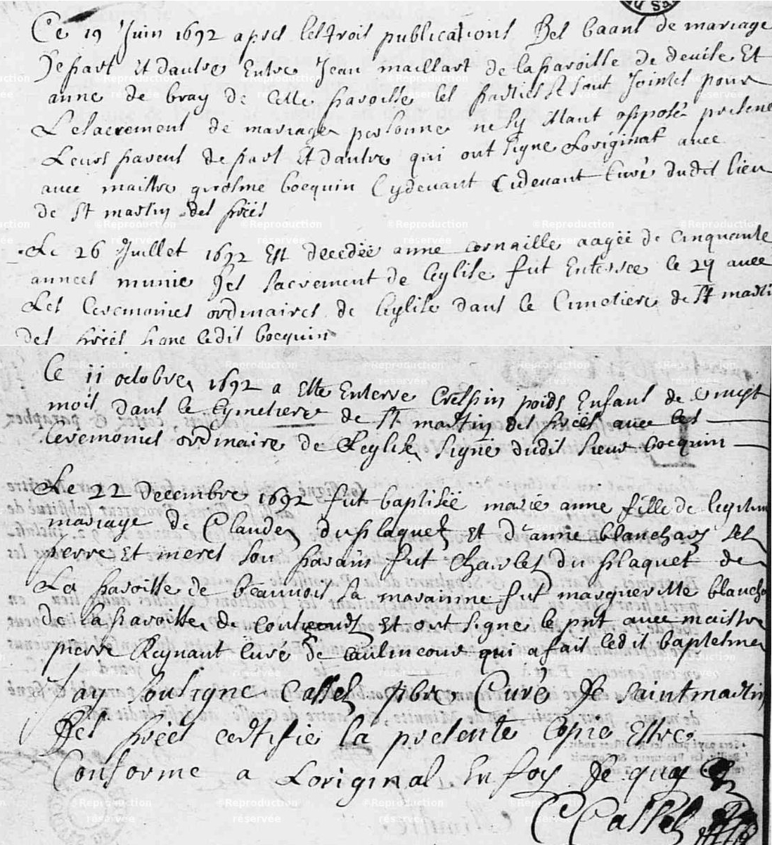 Registre d'Etat-civil de 1692